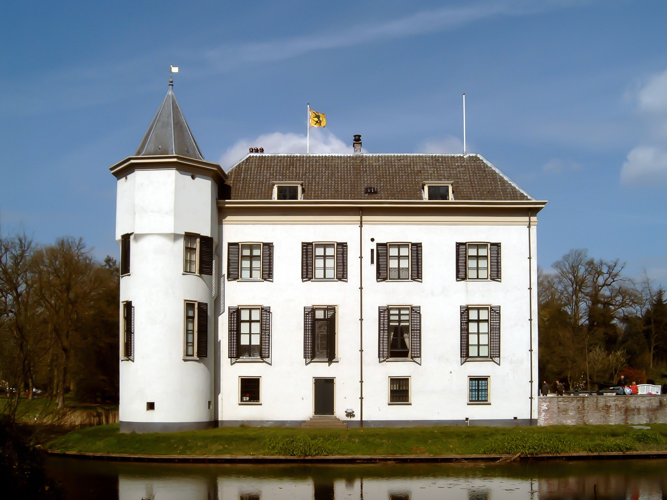 Doorn, museum: huis Doorn